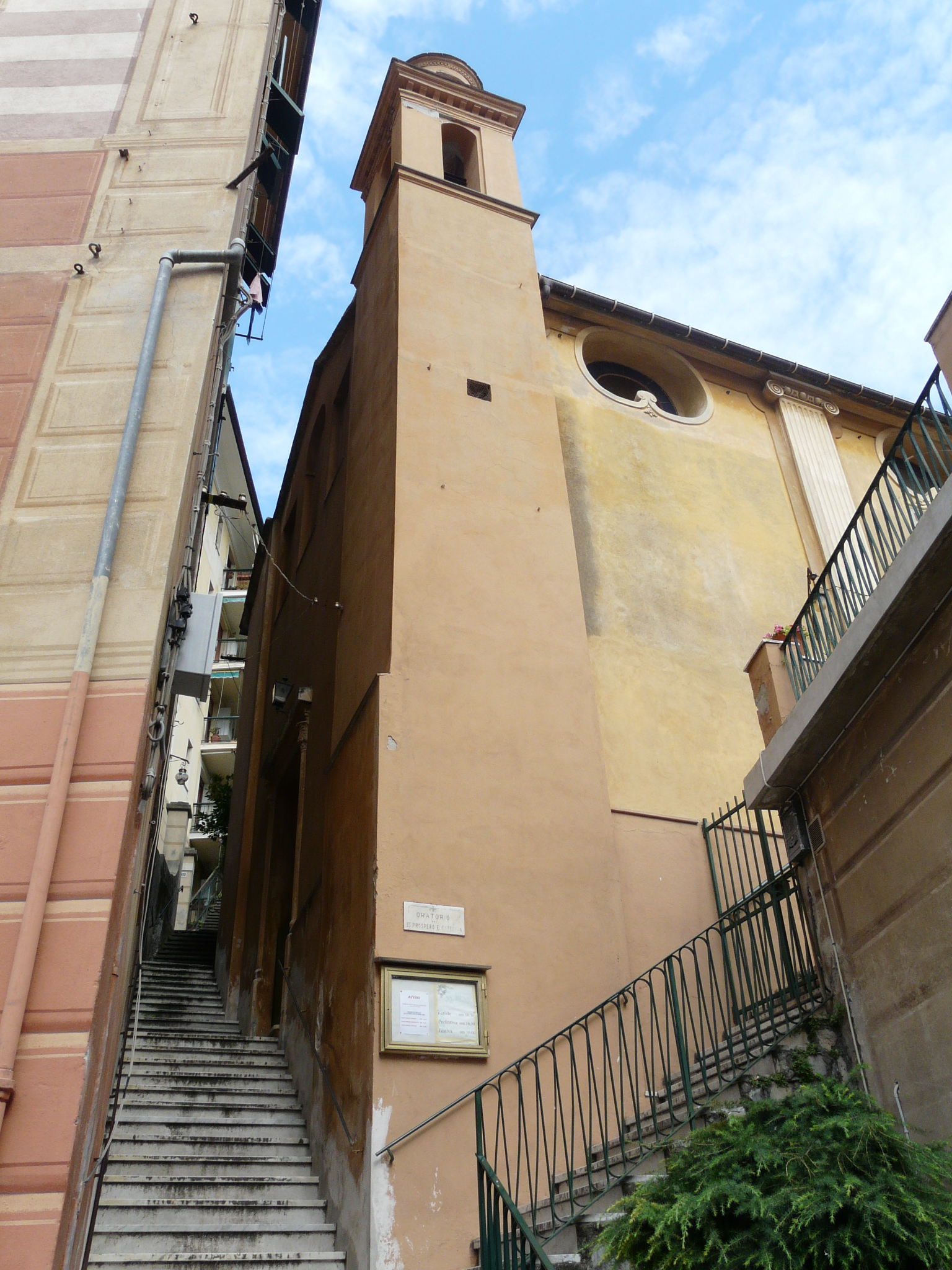 Oratorio di San Prospero e Santa Caterina, Camogli, Liguria, Italia